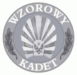 Odznaka tytułu honorowego "Wzorowy Kadet" – wzór 2010 – Polska.